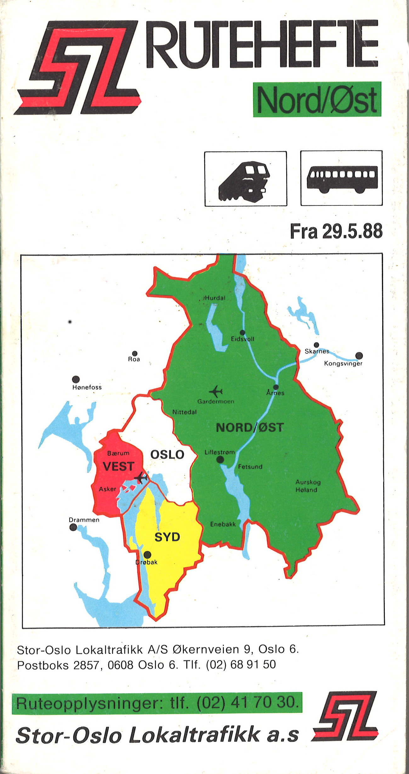 Rutebok/rutehefte for Stor-Oslo Lokaltrafikk a.s - 1988. "Nord/Øst".